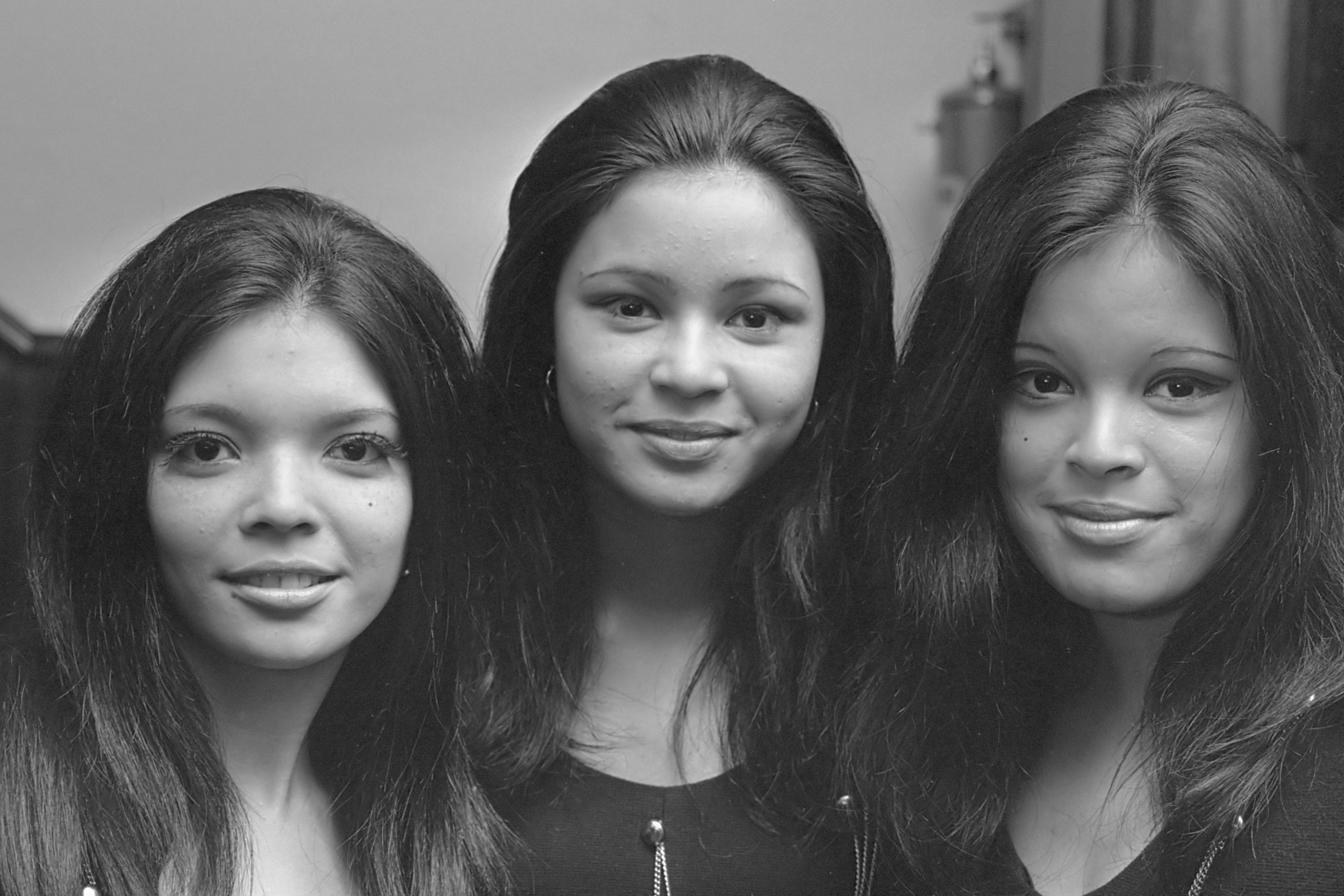 Hearts Of Soul tijdens de eerste voorronde voor het Nationaal Songfestival 1970